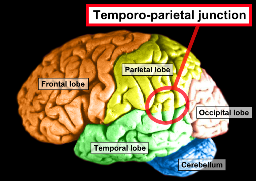 Temporoparietal junction.